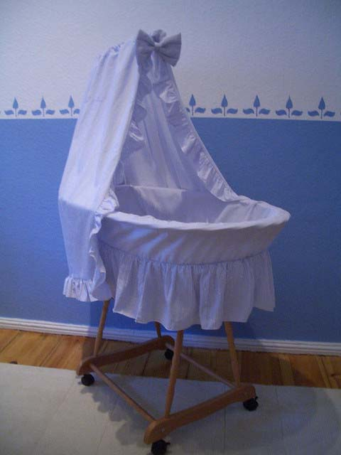 Stubenwagen für Säuglinge aus Weidengeflecht, mit Rollen und Stoffhimmel